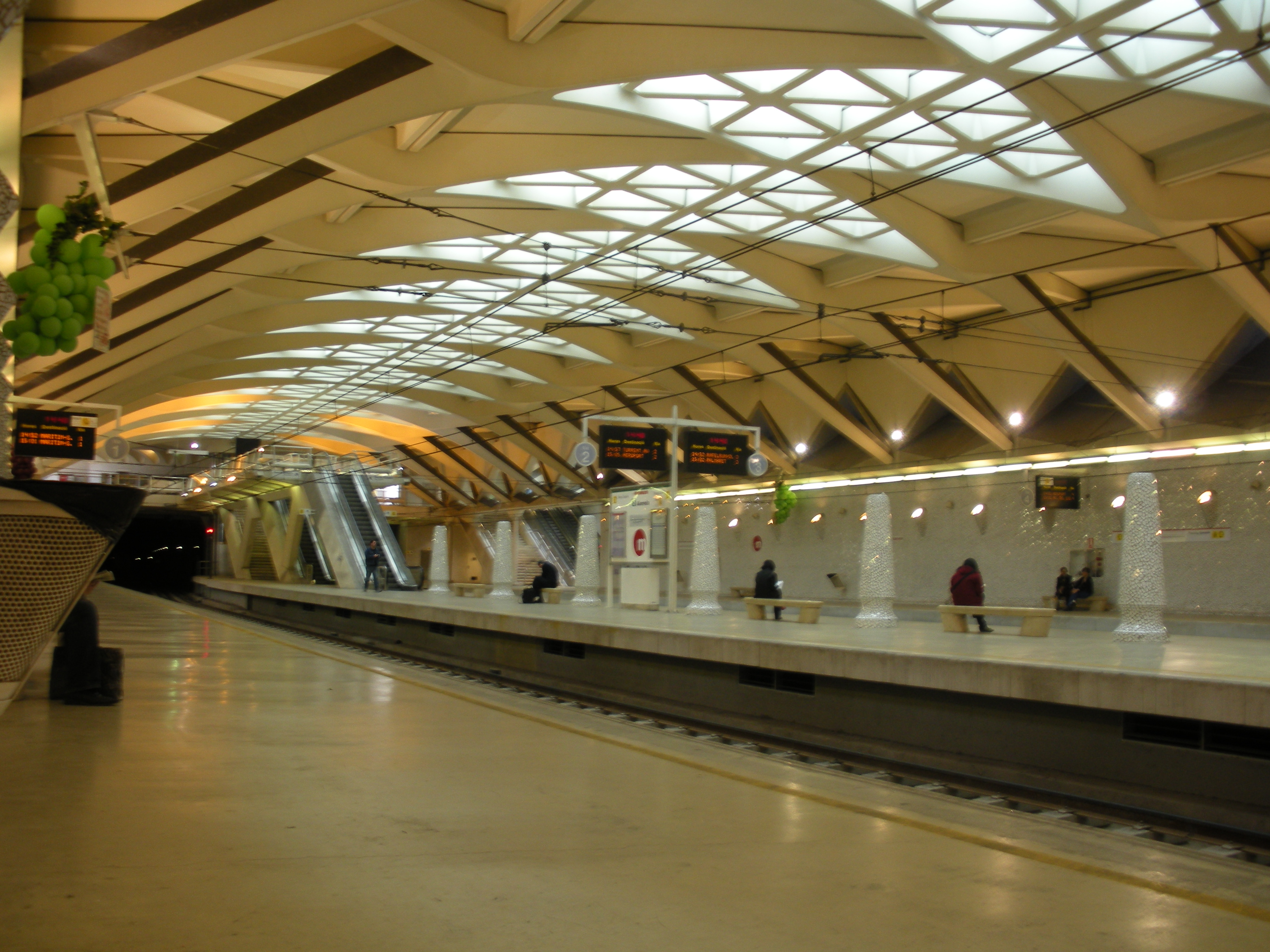 Estación de metro de alameda, en Valencia.